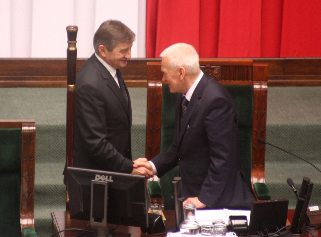 Zdjęcie zrobione podczas pierwszego posiedzenia Sejmu RP VIII kadencji